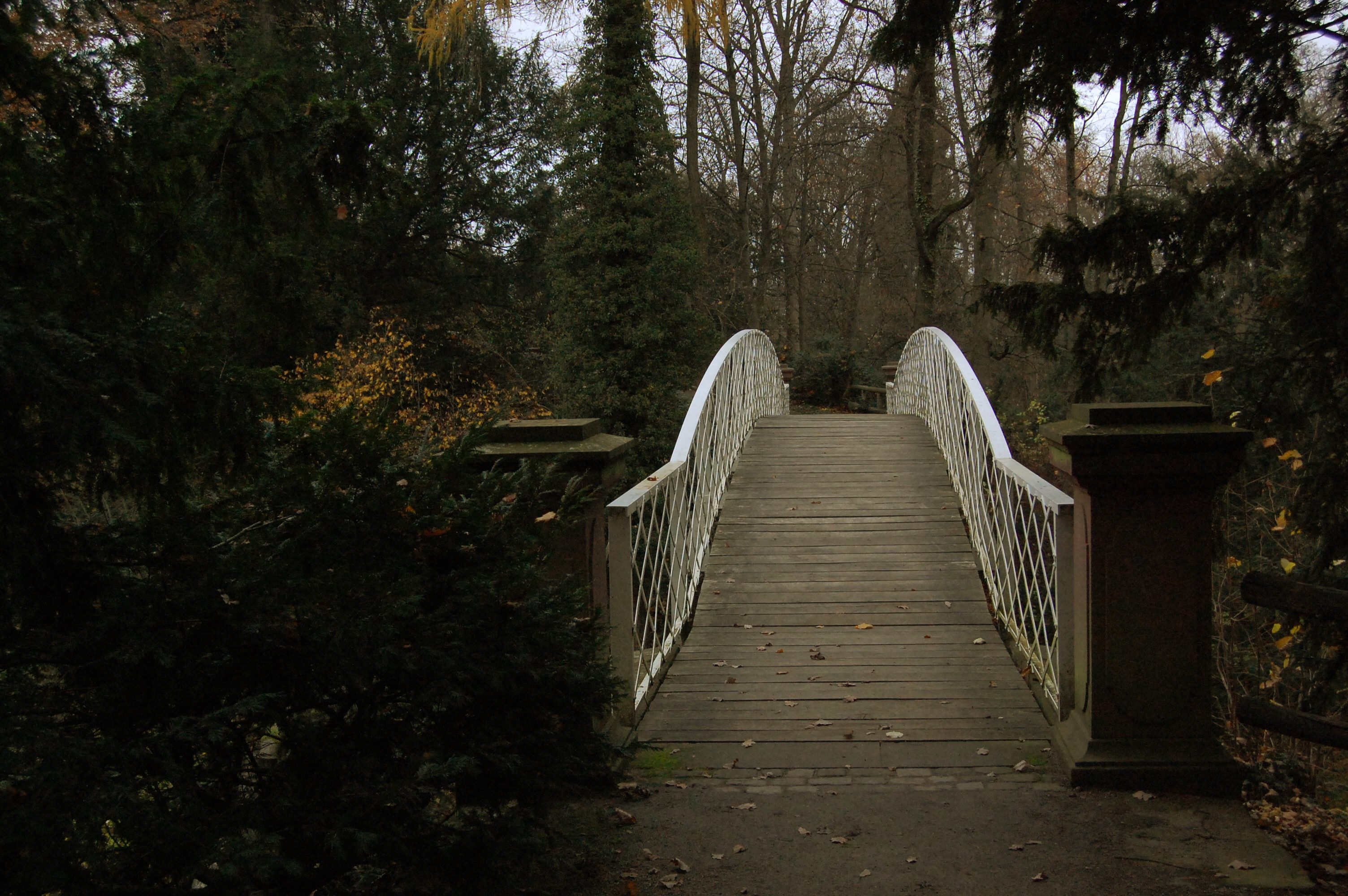 Tzw. diableski mostek